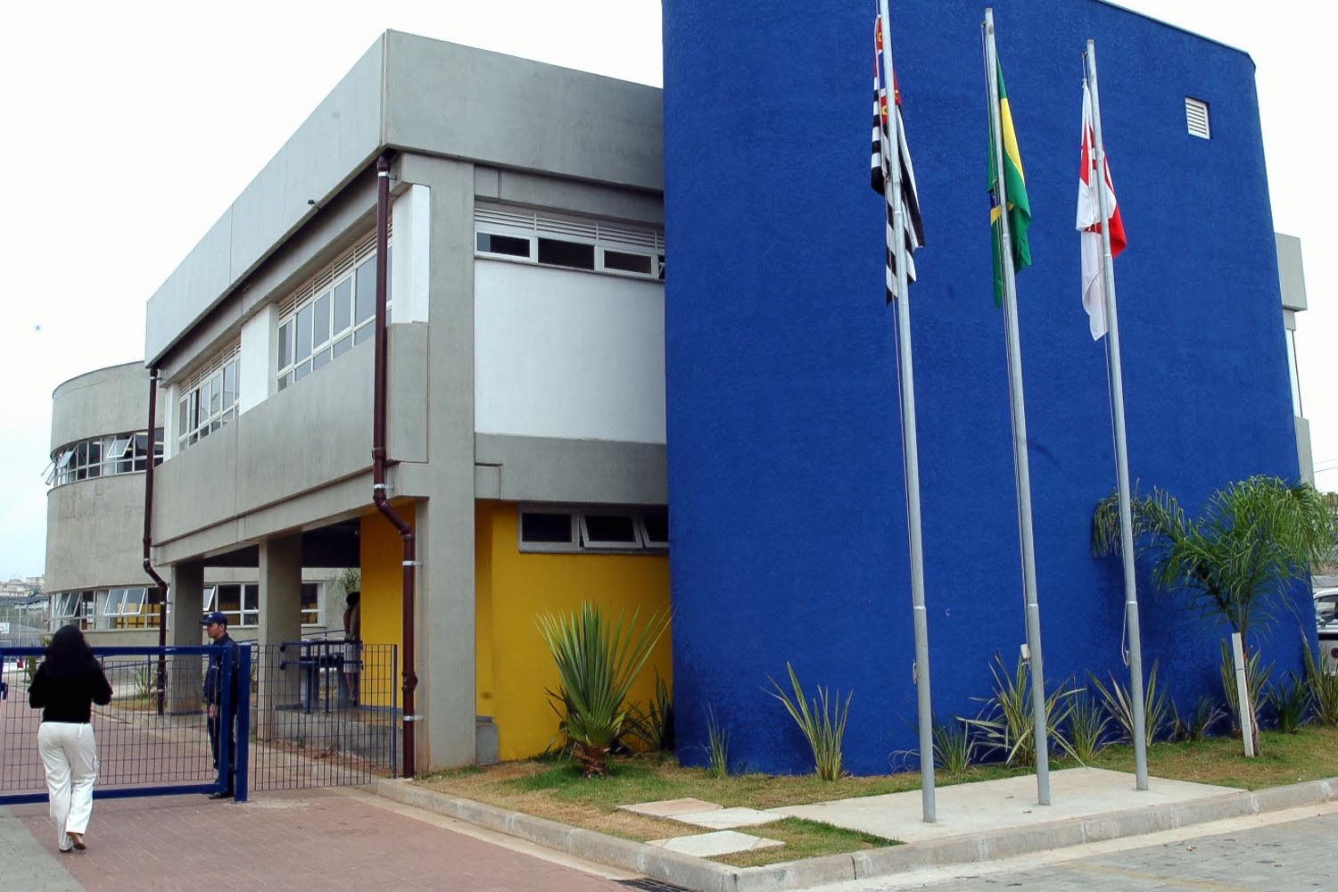 Imagem de SP